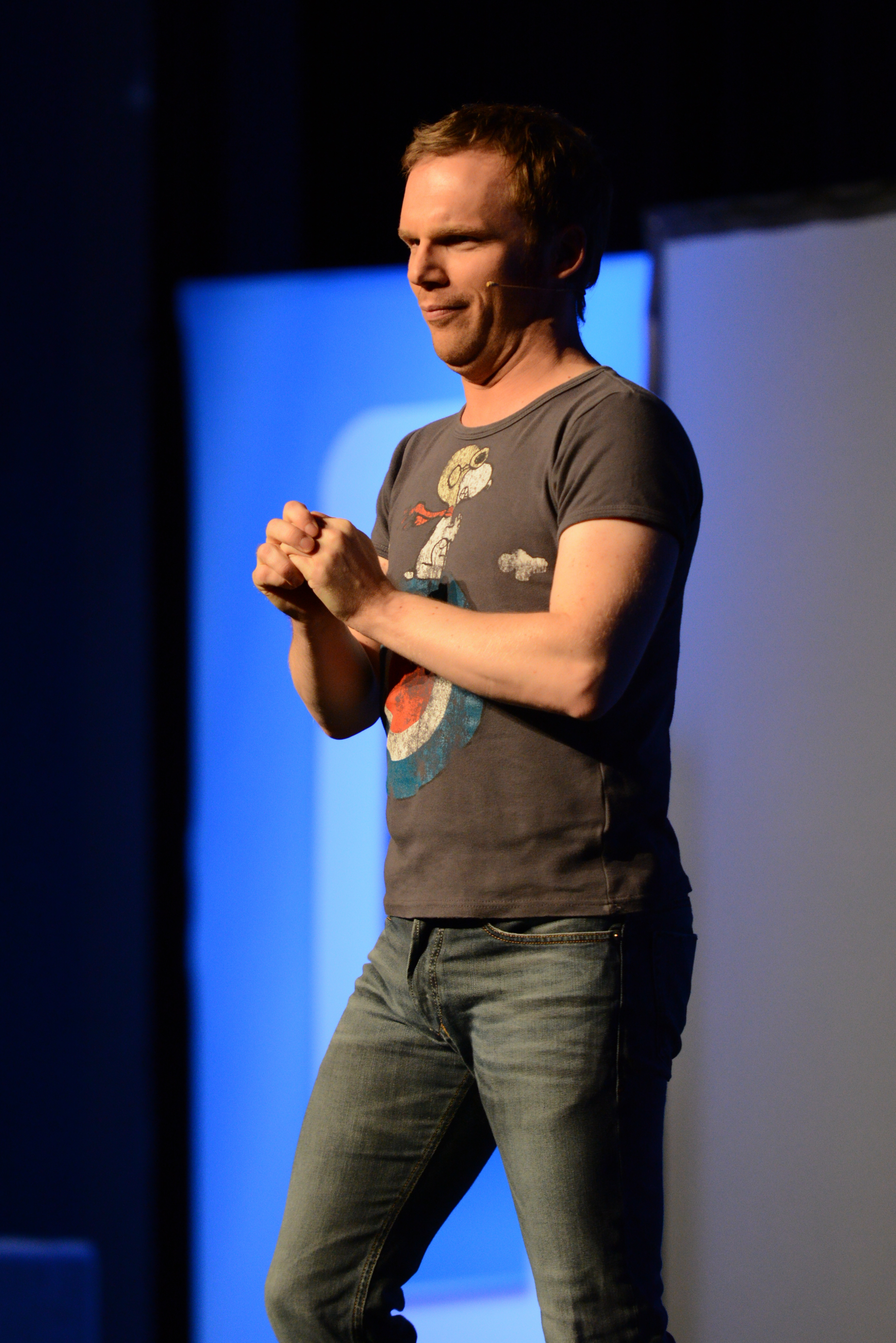 Ralf Schmitz bei einem Auftritt in der Stadthalle Mülheim.